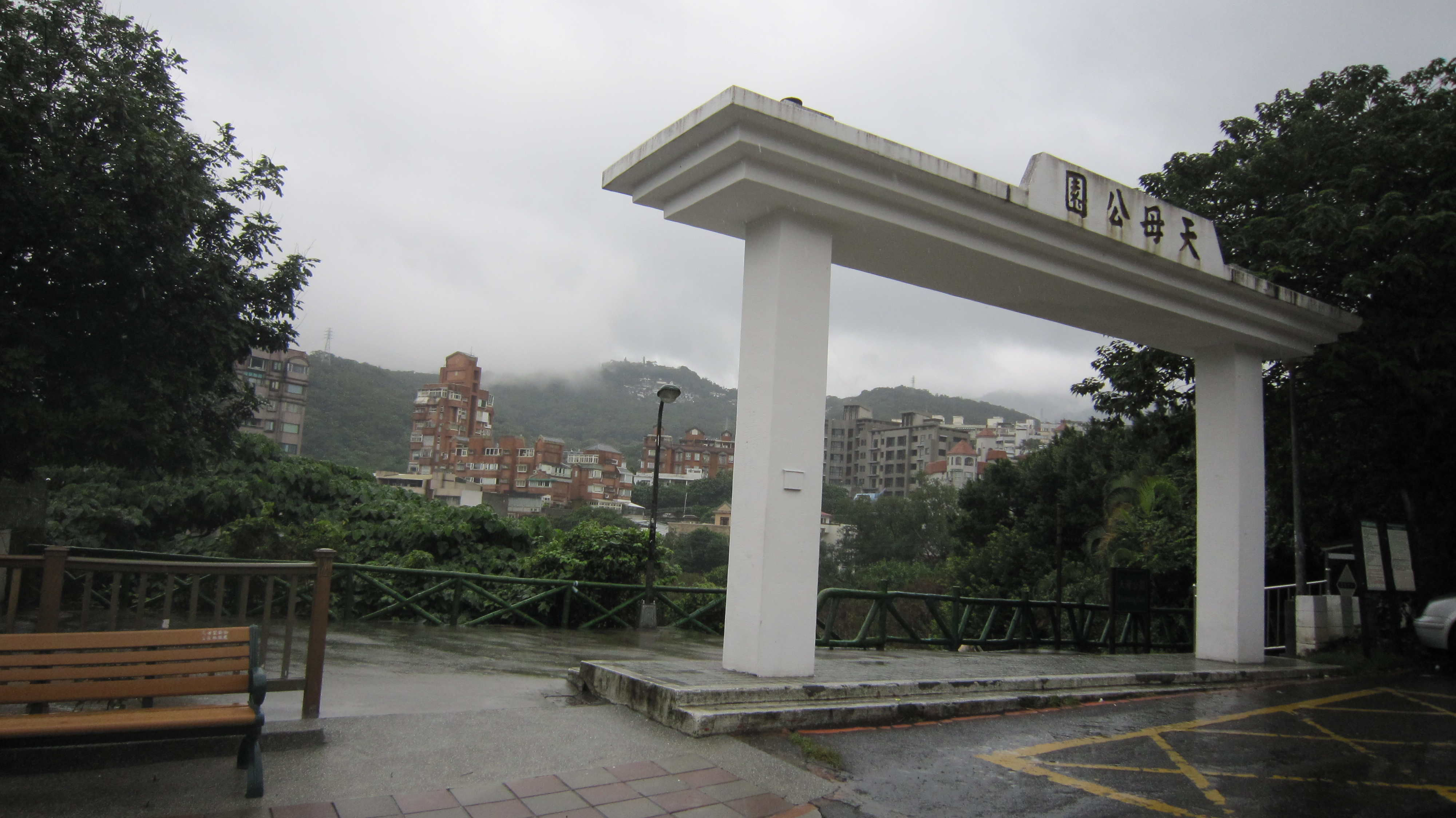 天母公園